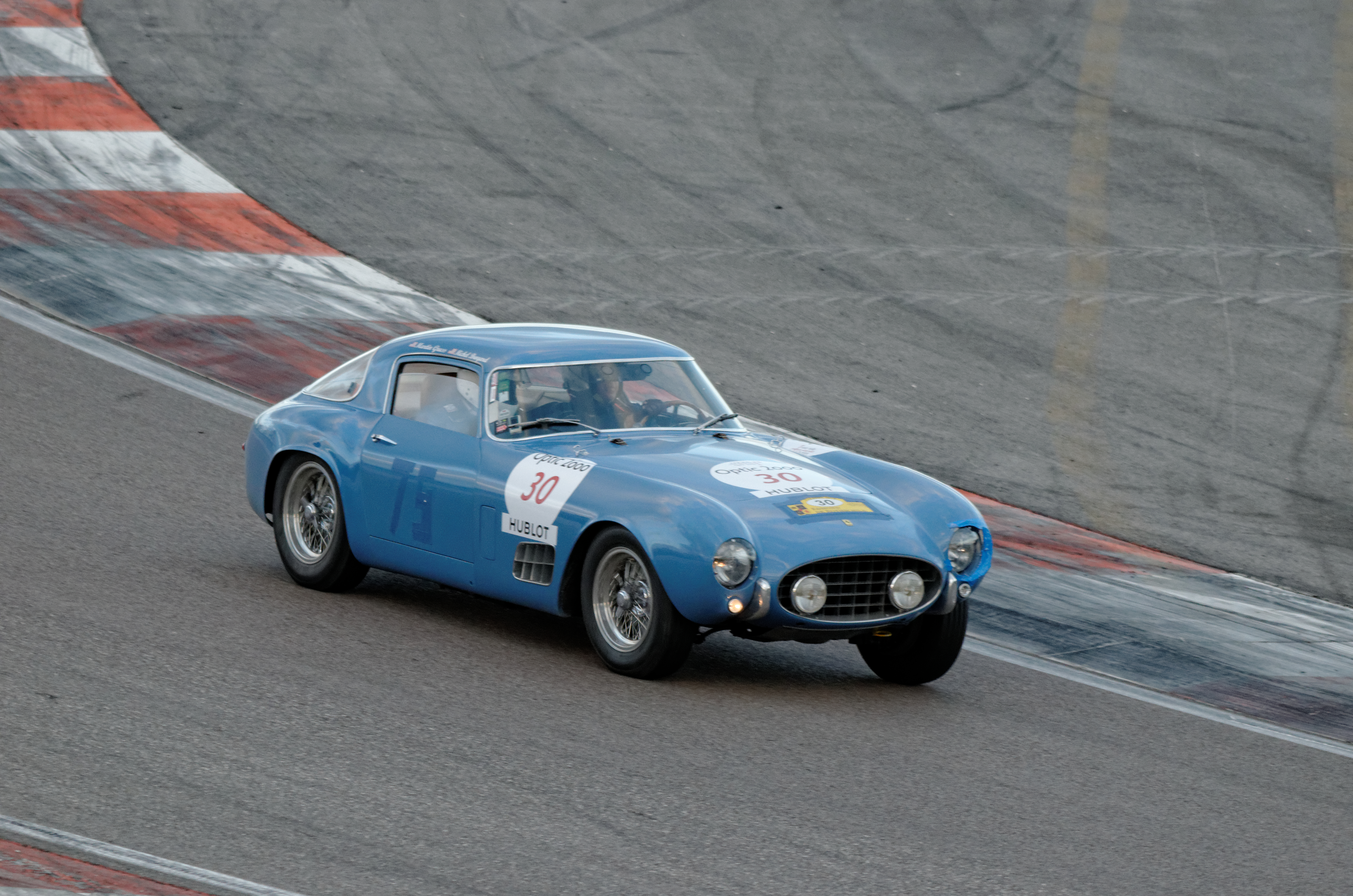 Ferrari 250 GT Berlinetta Tour de France, Tour Auto 2014, étape sur le Circuit de Prenois.